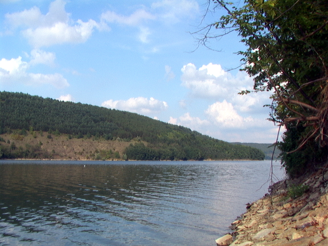 Берег Дністра біля Старої Ушиці. Берег Днестра у Старой Ушицы.